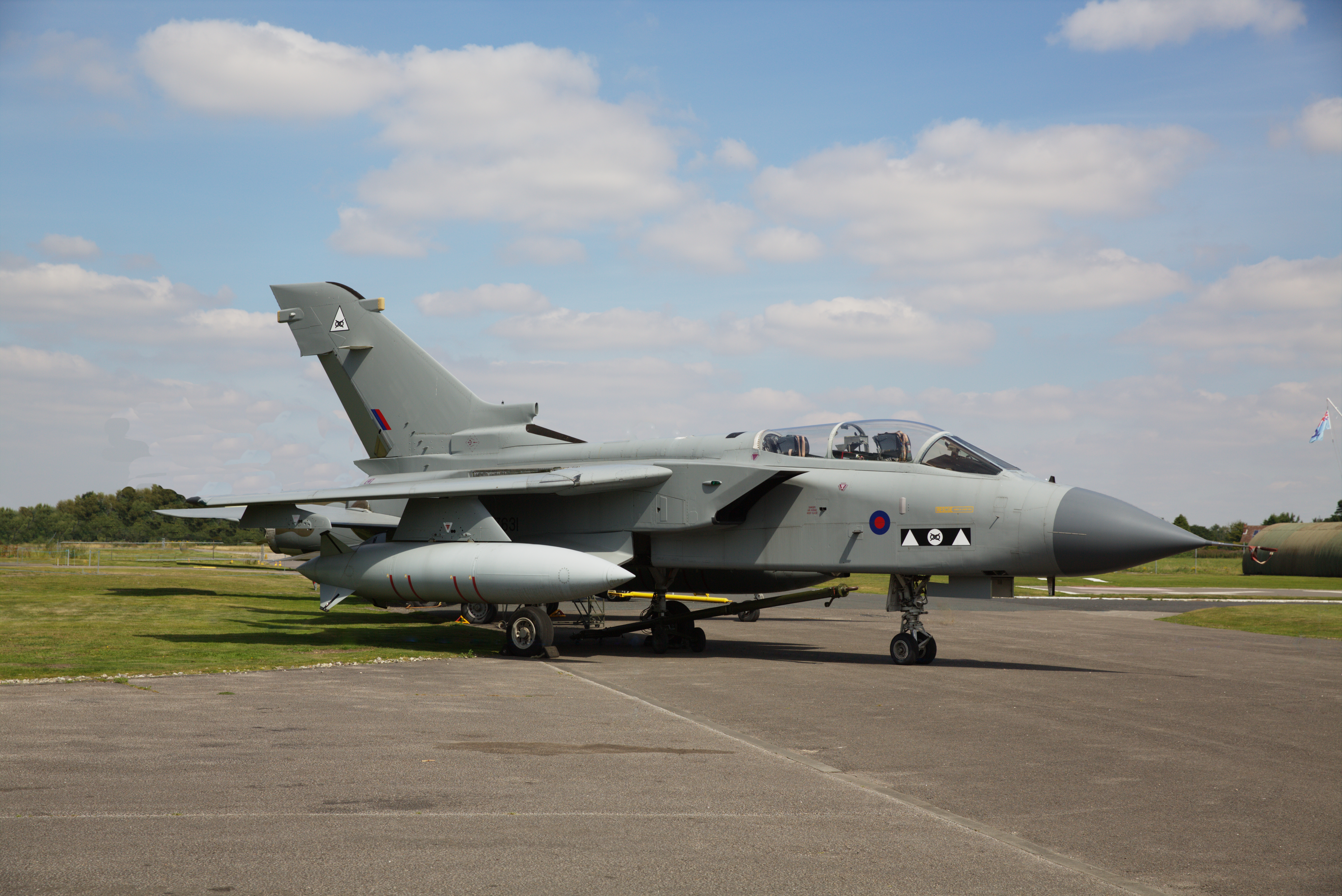 Panavia Tornado GR4 1